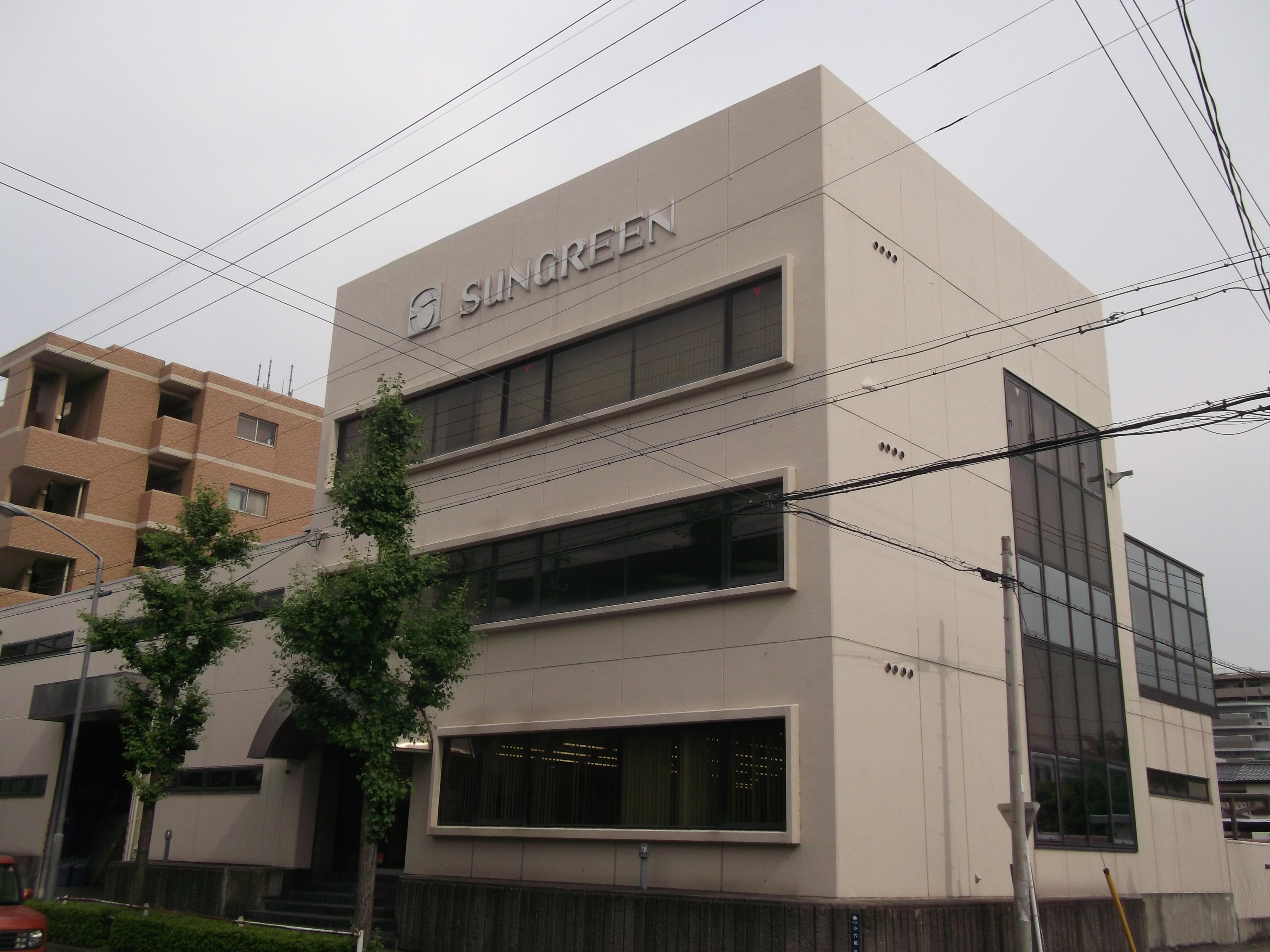 名古屋市守山区小六町のサングリーン本社を北側公道西側より写す